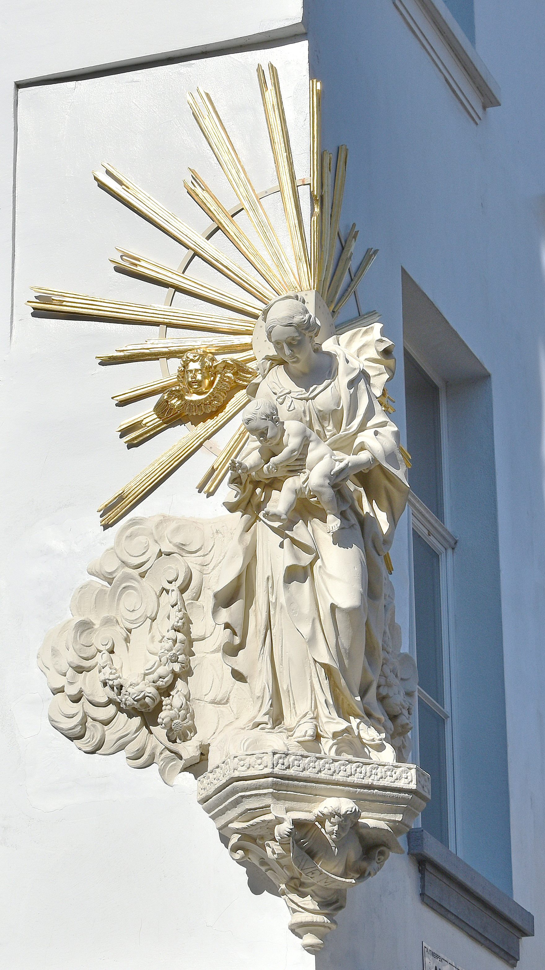 Laurentius Gillis (1688-1749) Onze-Lieve-Vrouw met Kind - Meir Antwerpen 27-09-2018 This photo of immovable heritage has been taken in the Flemish Region